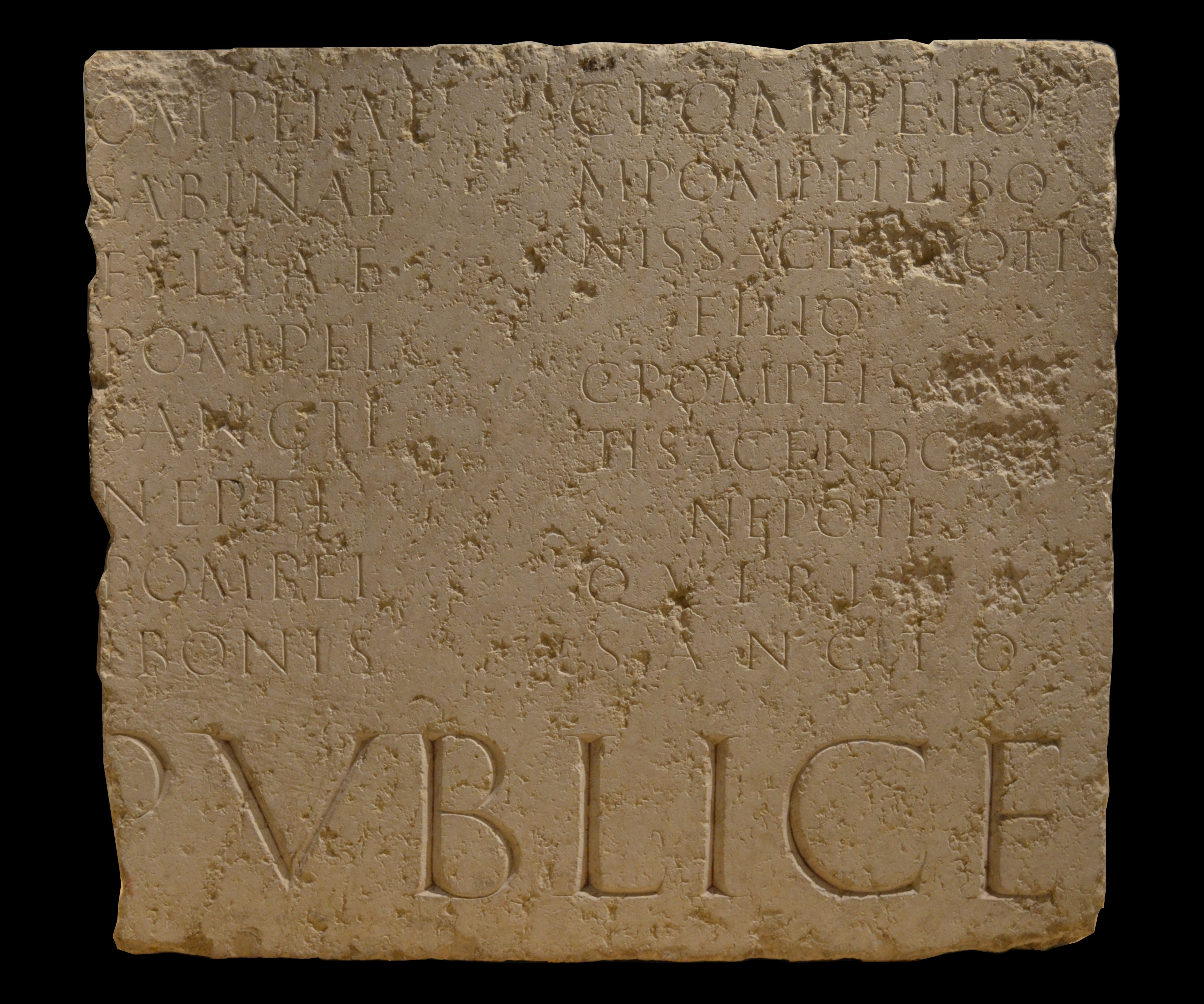 Musée gallo-romain de Fourvière (Lyon) - Stylobate trouvé à l'angle de la rue Pizay, dans la maison Gérard (lieu exact imprécis) à Lyon 1er. en novembre 1861 qui devait supporter quatre statues. Haut. 130cm ; larg. 150cm. Trois inscriptions : à gauche : [P]ompeiae / Sabinae / filiae / [C(aii)] Pompeii / Sancti, / nepti / [M(arci)] Pompeii / [L]ibonis : A Pompeia Sabina, fille de Caius Pompeius Sanctus, petite-fille de Marcus Pompeius Libo. à droite : C(aio) Pompeio / M(arci) Pompeii Libo/nis sacerdotis / filio / C(aii) Pompei(i) Sanc/ti sacerdotis / nepoti / Quirina / Sancto : A Caius Pompeius Sanctus, de la tribu Quirina, fils du prêtre Marcus Pompeius Libo, et petit-fils du prêtre Caius Pompeius Sanctus. à la base : [Petrucorii] publice : La cité des Pétrucores (ou Pétrocores) a élevé, avec des deniers publics ces statues.